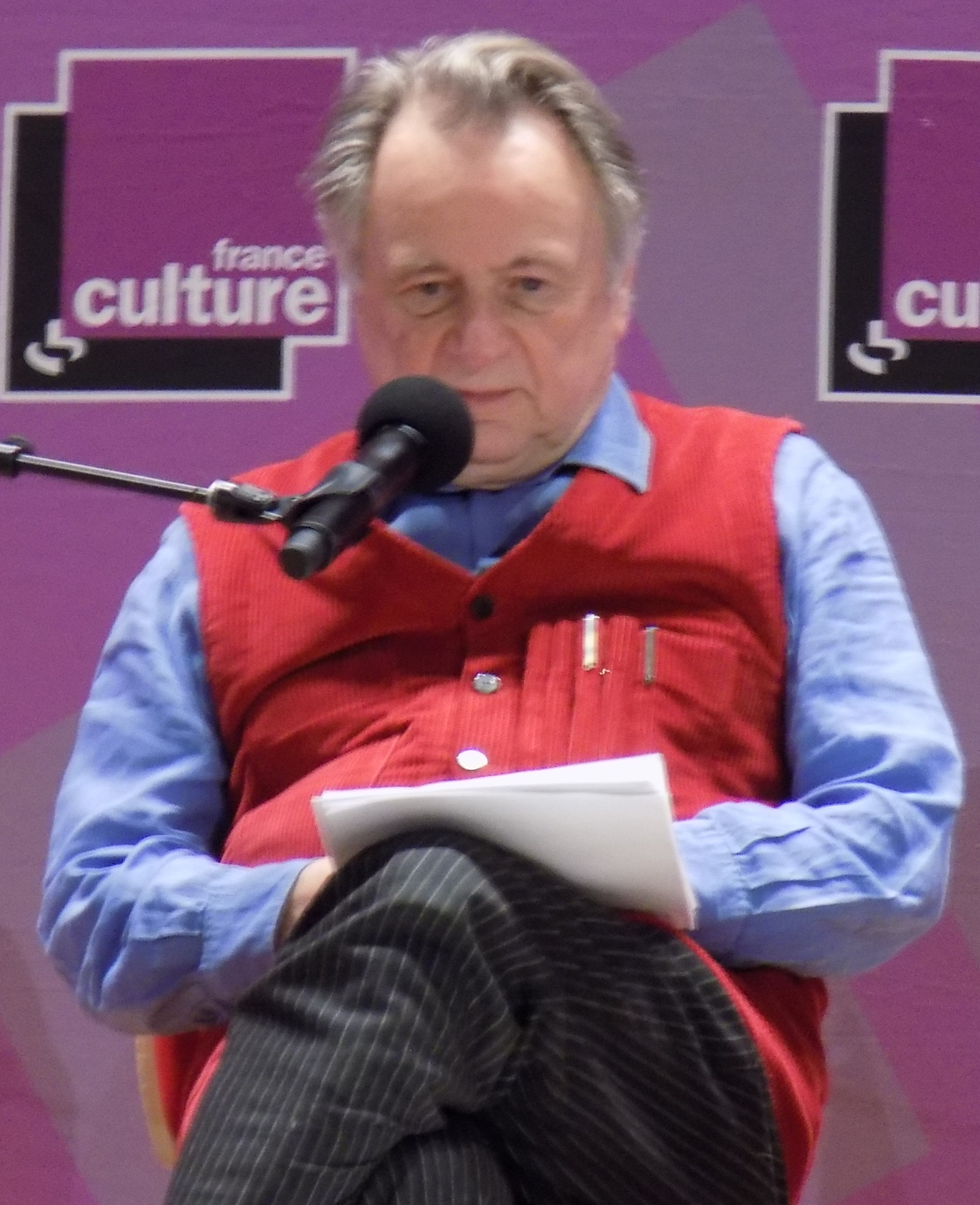 Régis Debray lors du forum « L’année vue par la philosophie » organisé par France Culture le 30 janvier 2016